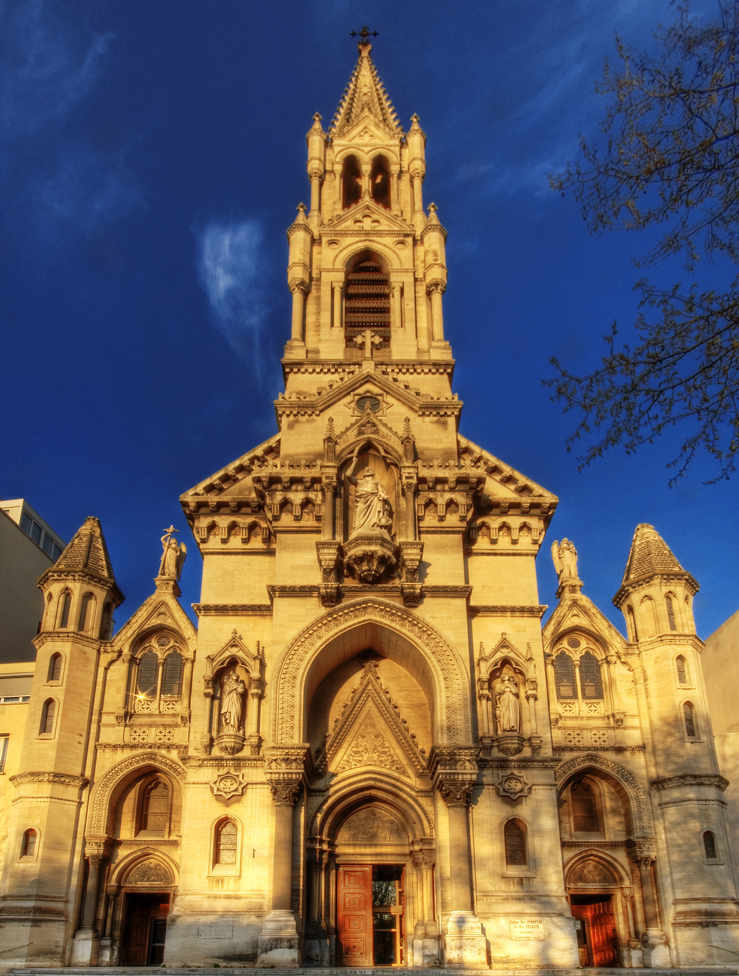 Take here a large view! Nimes (Nîmes en francés) es una ciudad del sur de Francia, capital del departamento de Gard, con una población de 133.424 habitantes (1999). Es famosa por la multitud de restos de la época romana que se conservan en bastante buen estado, destacando entre ellos el anfiteatro (la Arena de Nimes),donde aún se celebran espectáculos, fundamentalmente taurinos, y la Maison Carrée, antiguo templo romano y sede actualmente de un museo de escultura romana. Ambas construcciones datan del siglo I y se encuentran en el casco urbano. En sus alredores se hallan la torre Magna (aproximadamente del siglo I a.C.) y el puente de Gard (19 a.C.), uno de los más famosos acueductos romanos, construido por Agripa. Son también reseñables la catedral de Saint Castor (cuya construcción empezó en el siglo XI) así como varios museos de arqueología, y los Jardins de la Fontaine (Jardines de la Fuente) del siglo XVIII. From Wikipedia, the free encyclopedia